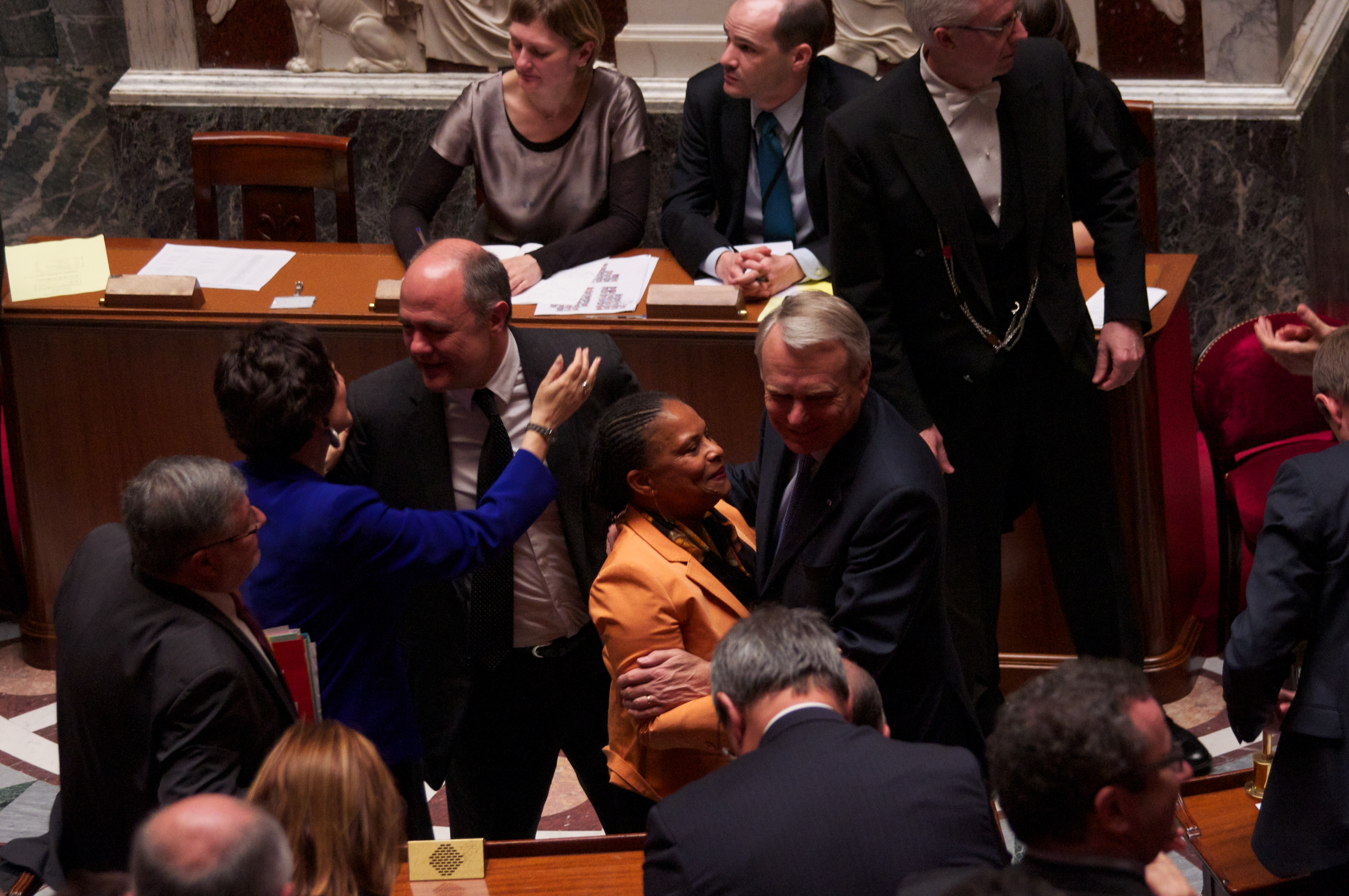 Christiane Taubira félicitée par Jean-Marc Ayrault, premier ministre, après le vote solennel de la loi ouvrant le mariage aux couples de personnes de même sexe - Assemblée nationale